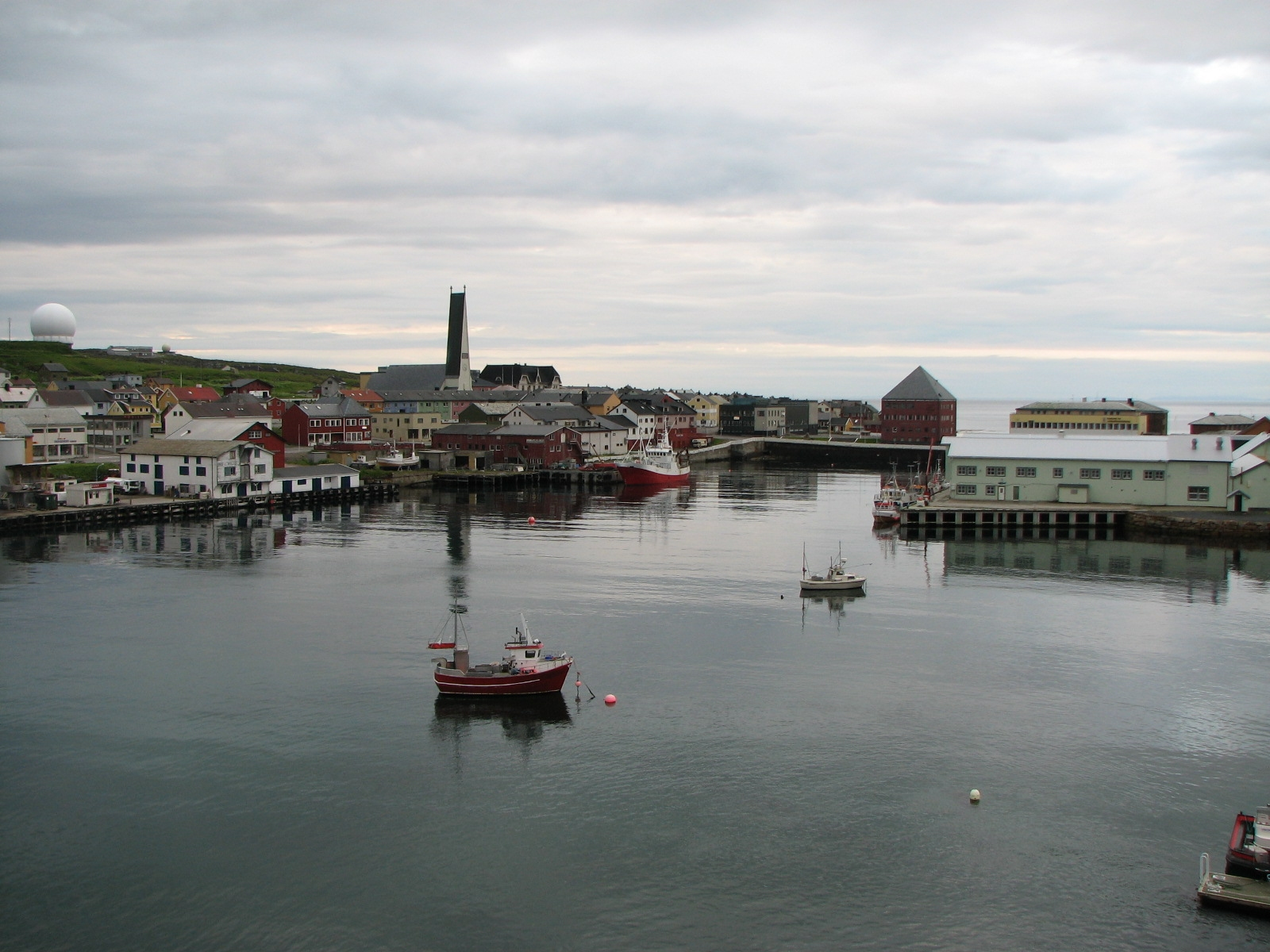 Sommernatt i Vardø juli 2008